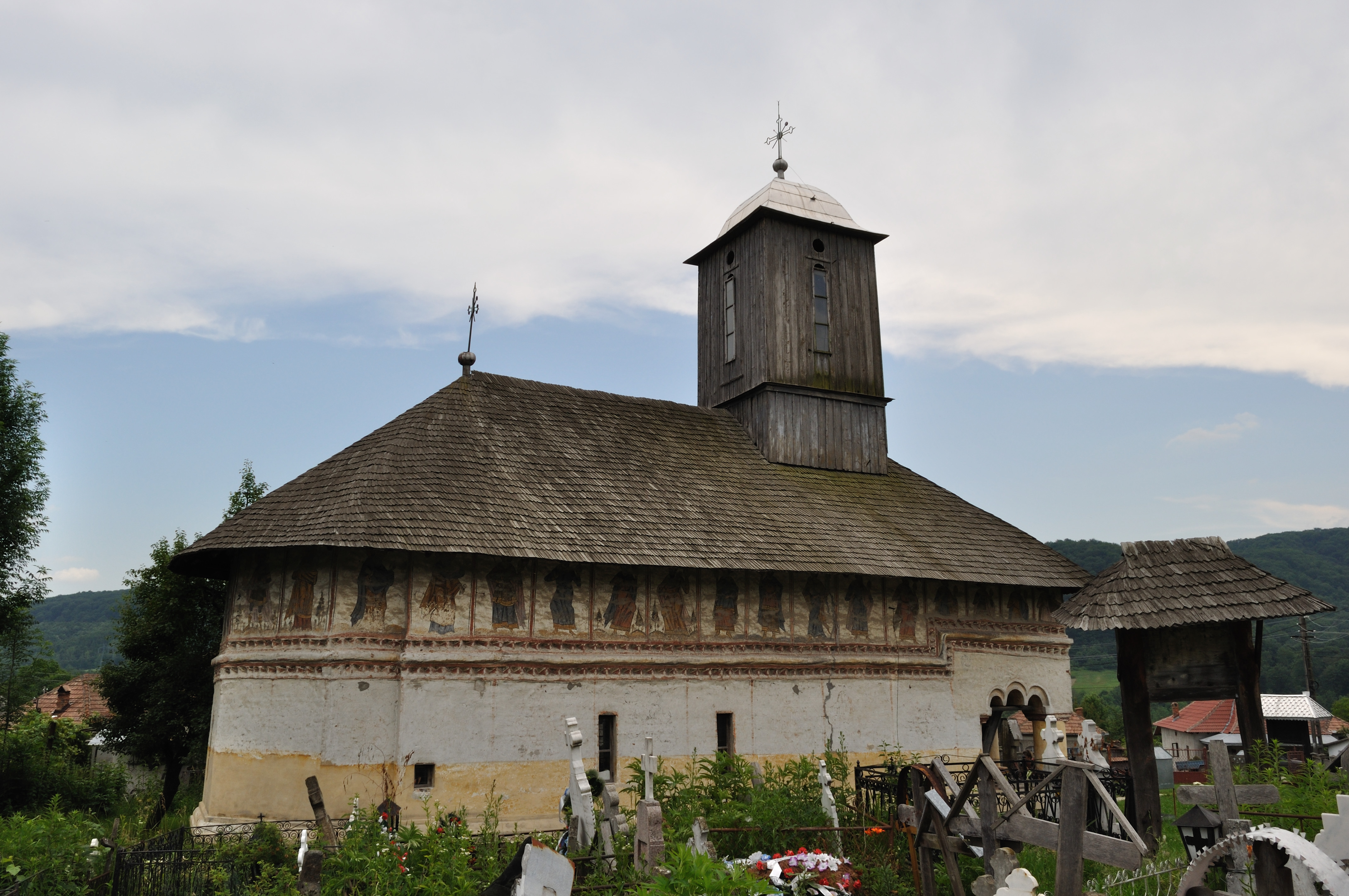 Biserica monument „Sf.Trei Ierarhi” din Genuneni, Vâlcea